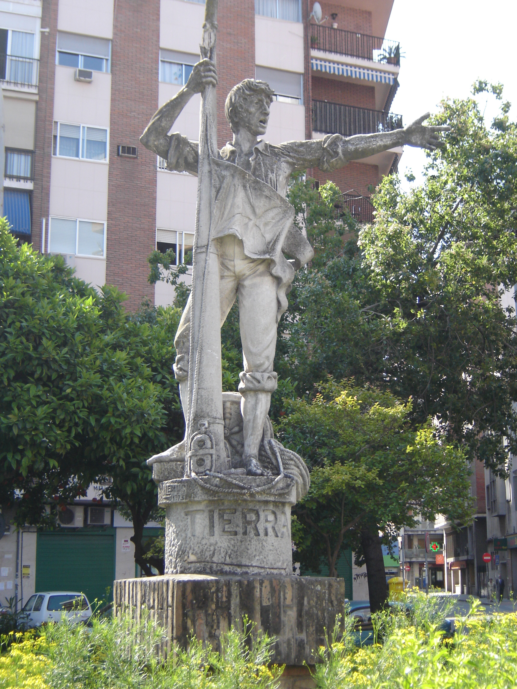 Monumento (en Sevilla) a Rodrigo de Triana, primer hombre en ver el Nuevo Mundo.